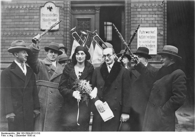 Der Mann mit der schwarzen Hornbrille und der "weissen Nelke" heiratet. Der bekannte Kapellmeiser Julian Fuhs hat noch kurz vor Jahresschluss mir Fräulein Lily Löwenthal aus Wien den Weg zu Standesamt angetreten. Scherl / Atlantic